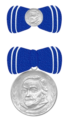 Grafische Darstellung der Clara-Zetkin-Medaille